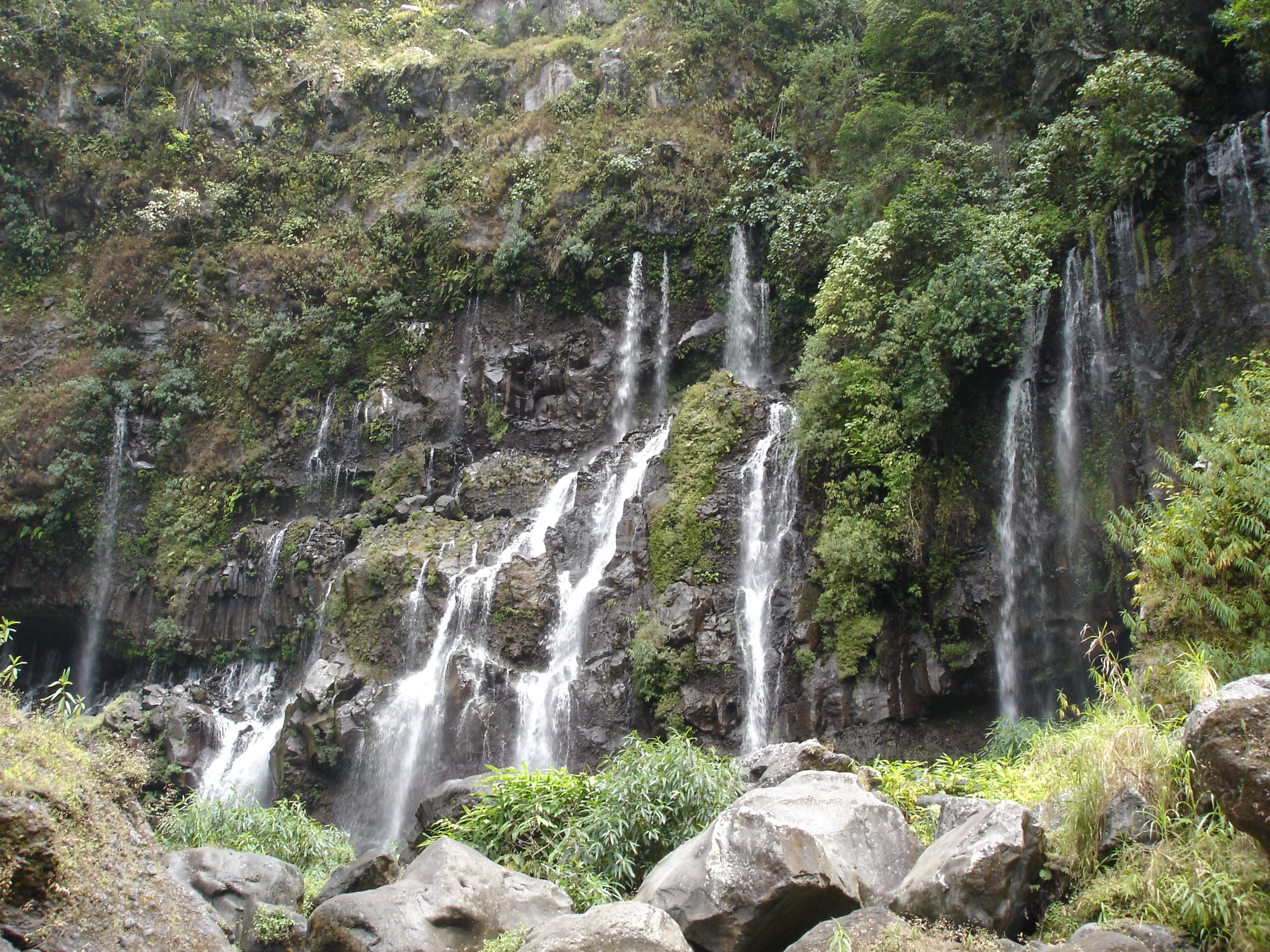 Description: Cascade de la Grande Ravine à Grand Galet, novembre 2004, La Réunion Source: Bouba